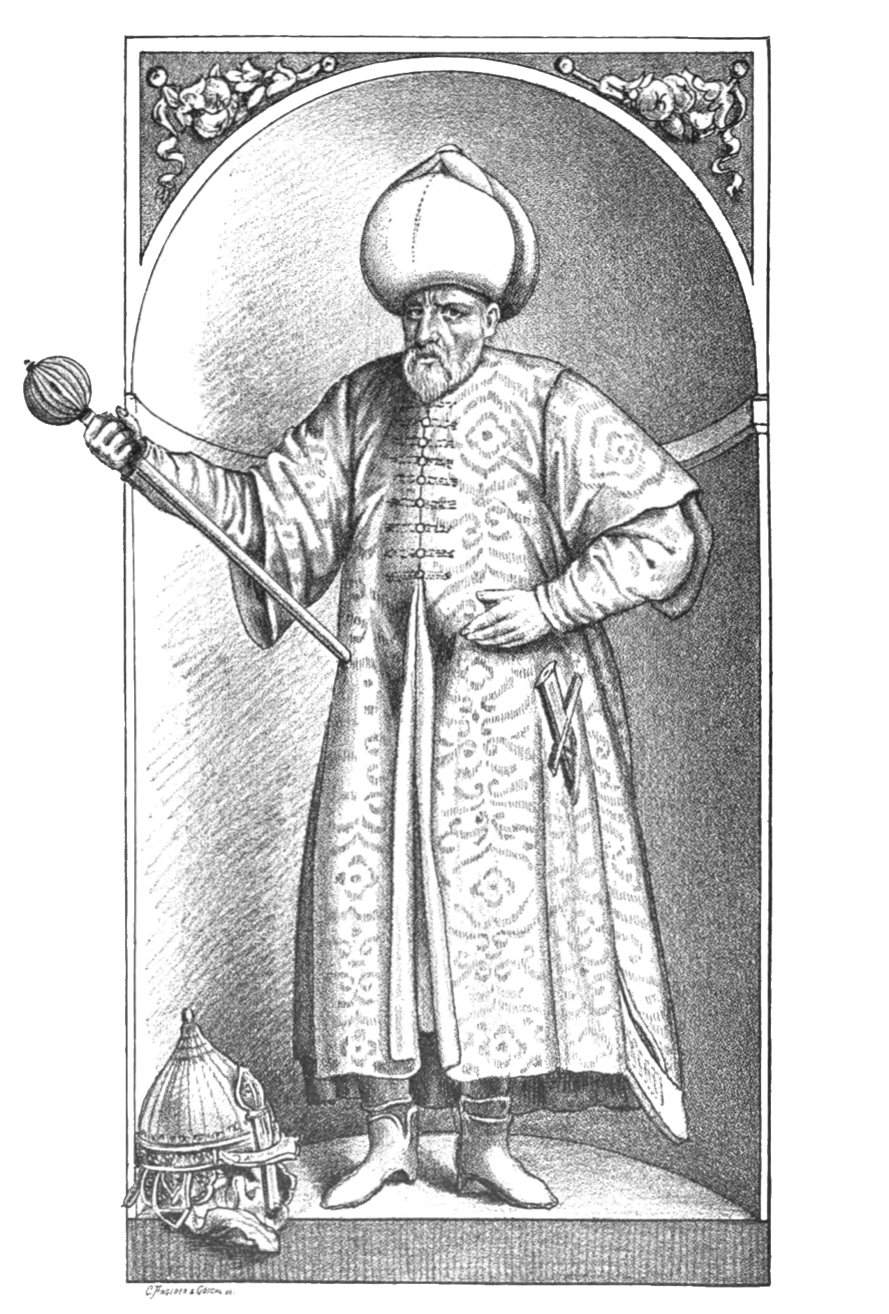 Sokollu Mehmet Paşa Мехмед-паша Соколовић circa 1505 date QS:P,+1505-00-00T00:00:00Z/9,P1480,Q5727902 - 11 October 1579)